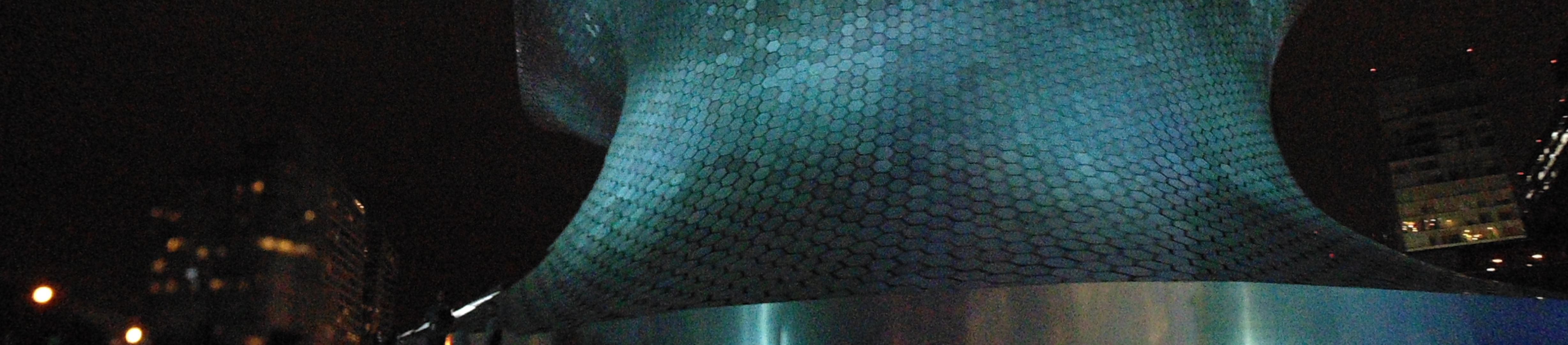 Panorámica al noche del Museo Soumaya Plaza Carso — México, D. F.